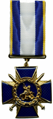 Нагрудний знак «Хрест Доблесті» I ступеня Опис нагрудного знака «Хрест Доблесті» Нагрудний знак «Хрест Доблесті» виготовляється з металу і має форму прямого рівностороннього хреста з розбіжними сторонами синьої емалі. Посередині хреста - круглий медальйон із зображенням на синьому емалевому тлі фігури св. Георгія Переможця. Медальйон обрамлено вінком із зображенням дубового листя. Між сторонами хреста розміщено два схрещені мечі вістрям угору на тлі розбіжних променів. Розмір хреста - 40 х 40 мм. Нагрудний знак «Хрест Доблесті» I ступеня має пружки хреста, усі зображення, мечі та промені - жовтого металу. Зворотний бік знака плоский з вигравіруваним номером. За допомогою кільця хрест з'єднується з колодкою, яка має вигляд прямокутної металевої пластини, обтягнутої стрічкою. Колодка для нагрудного знака "Хрест Доблесті" I ступеня виготовляється з жовтого металу. У нижній частині колодки - тонка металева фігурна дужка із закругленим виступом та отвором посередині для сполучення колодки із знаком відзнаки. Розмір колодки: висота - 42 мм, ширина - 28 мм. При цьому розмір фігурної дужки: висота - 2 мм, ширина - 30 мм, висота заокругленого виступу - 2 мм. На зворотному боці колодки - прорізи для прикріплення стрічки, а також застібка для кріплення нагрудного знака «Хрест Доблесті» до одягу. Стрічка нагрудного знака «Хрест Доблесті» I ступеня шовкова муарова синього кольору з поздовжніми смужками білого в центрі та жовтого кольорів з боків. Ширина білої смужки - 12 мм, жовтих смужок - по 2 мм кожна. Планка відзнаки являє собою металеву пластинку, обтягнуту відповідною стрічкою. Розмір планки: висота - 12 мм, ширина - 28 мм.